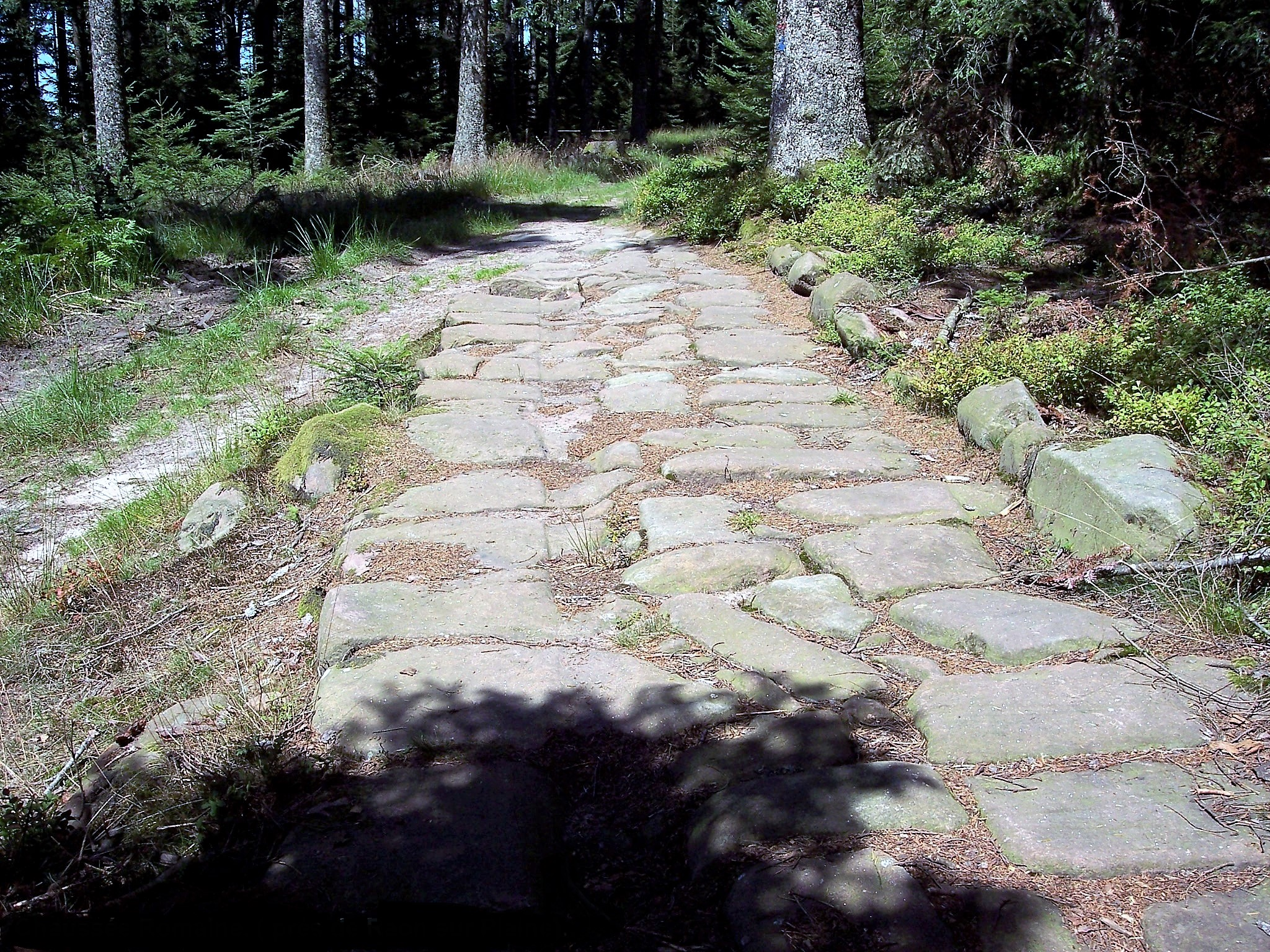 Chaussée Romaine. Raon-sur-Plaine. Vosges